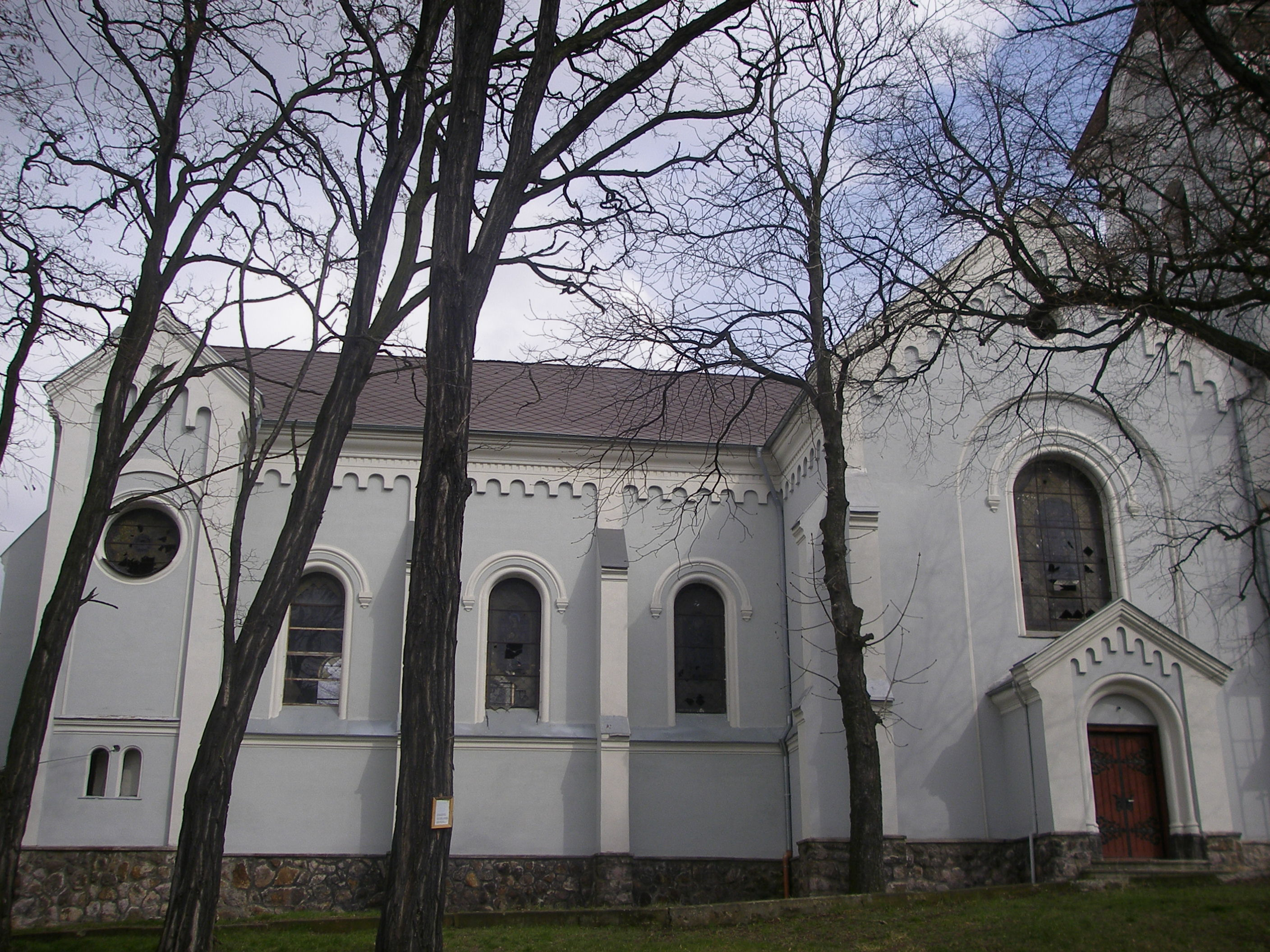 Kostol Sv. Vavrinca v Horných Opatovciach